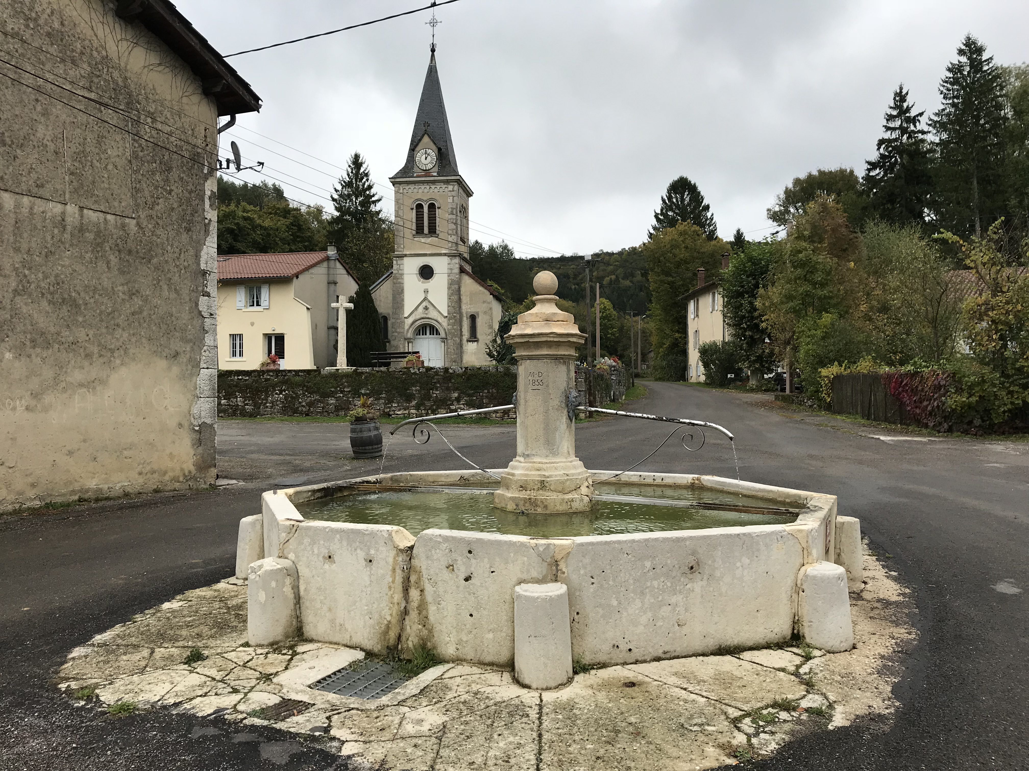 Villechantria (Jura, France) en octobre 2017.